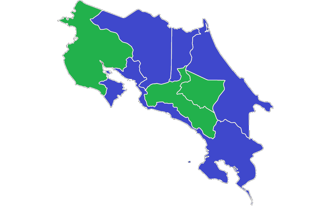 Resultados electorales provinciales 1966